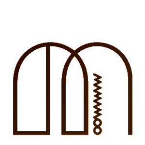 Logo del primer álbum de estudio del grupo surcoreano Mamamoo.